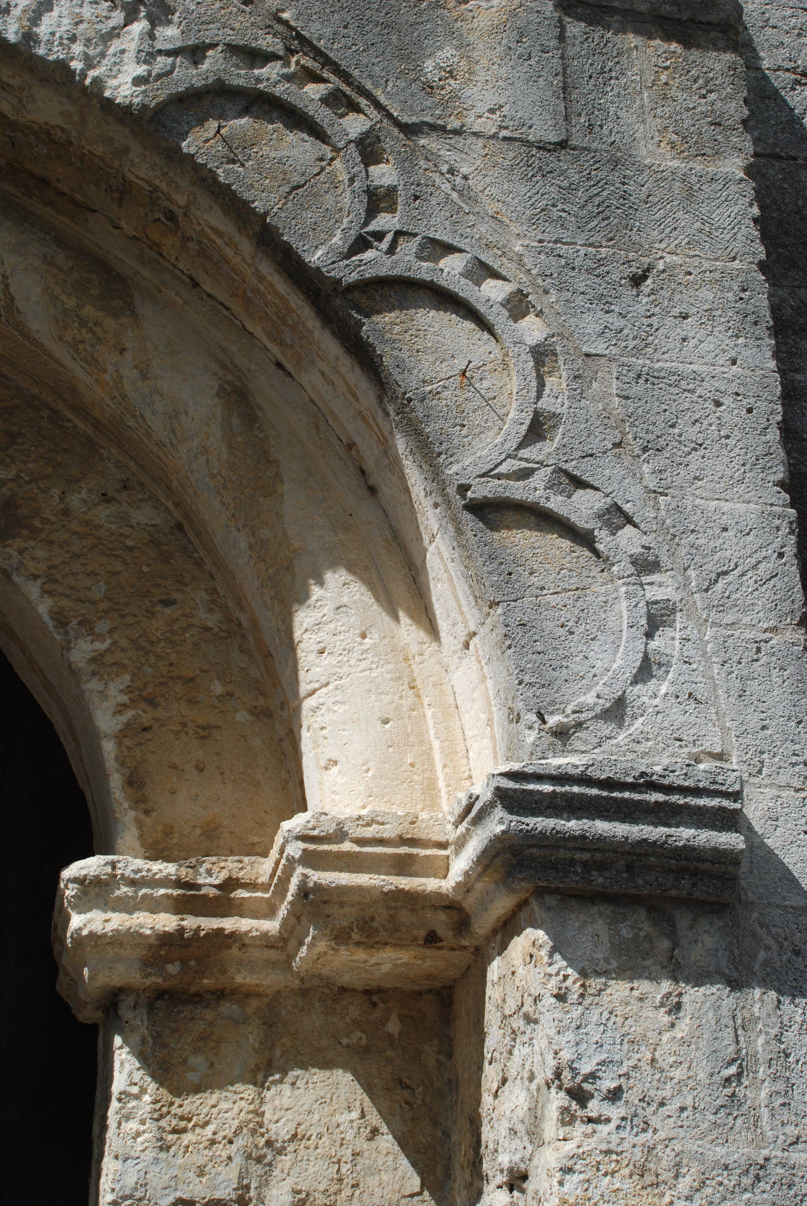 France - Provence - Boulbon - Saint-Marcellin